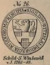 Schildsiegel des Rügenfürsten Wizlw II. aus 1265